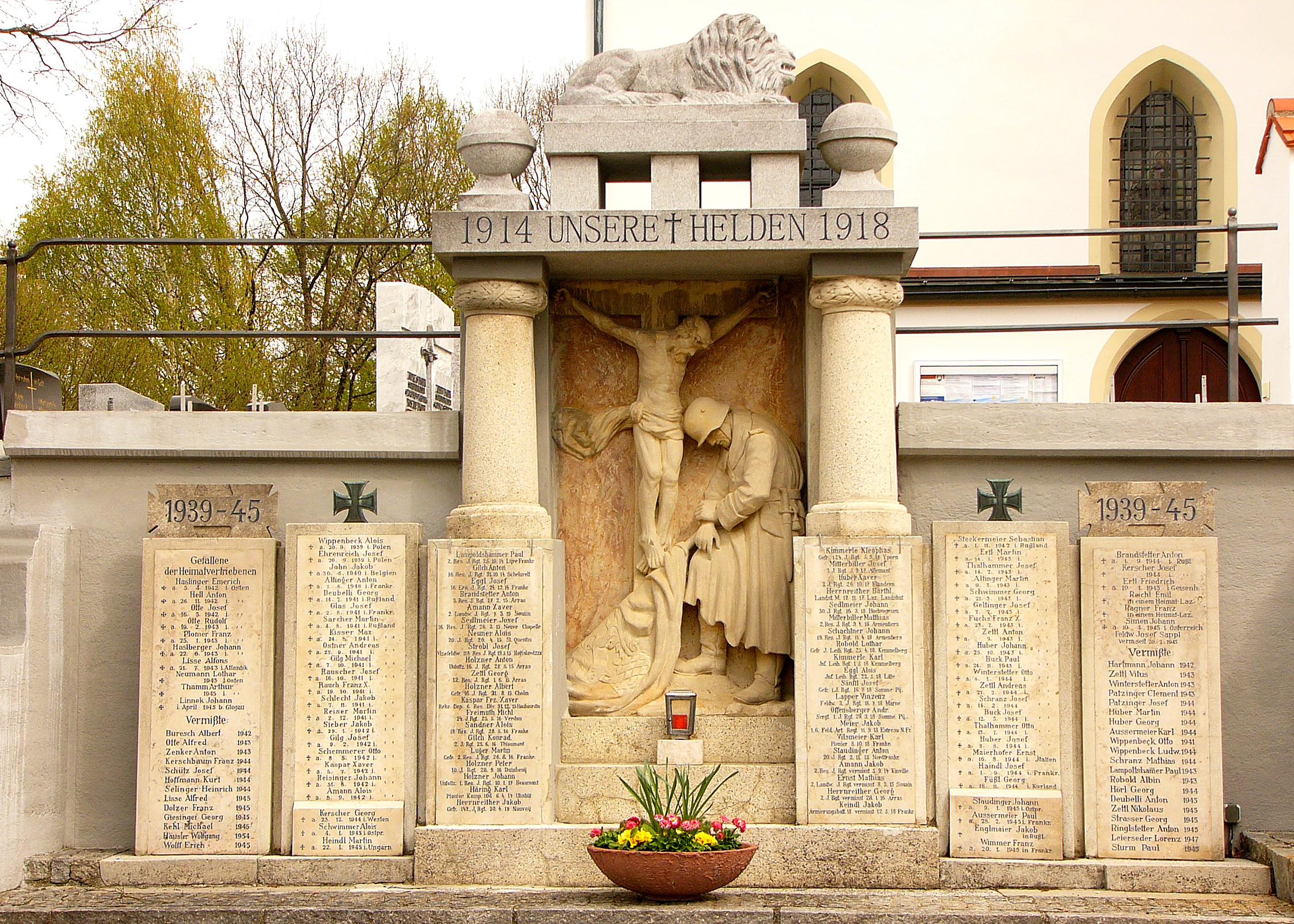 Kriegerdenkmal für die Gefallenen der Weltkriege 1914-18 und 1939-45; säulengestützter Torbau mit Steinrelief in massiv ausgebauter Nische mit Gedenktafeln, nach 1945. This is a photograph of an architectural monument.